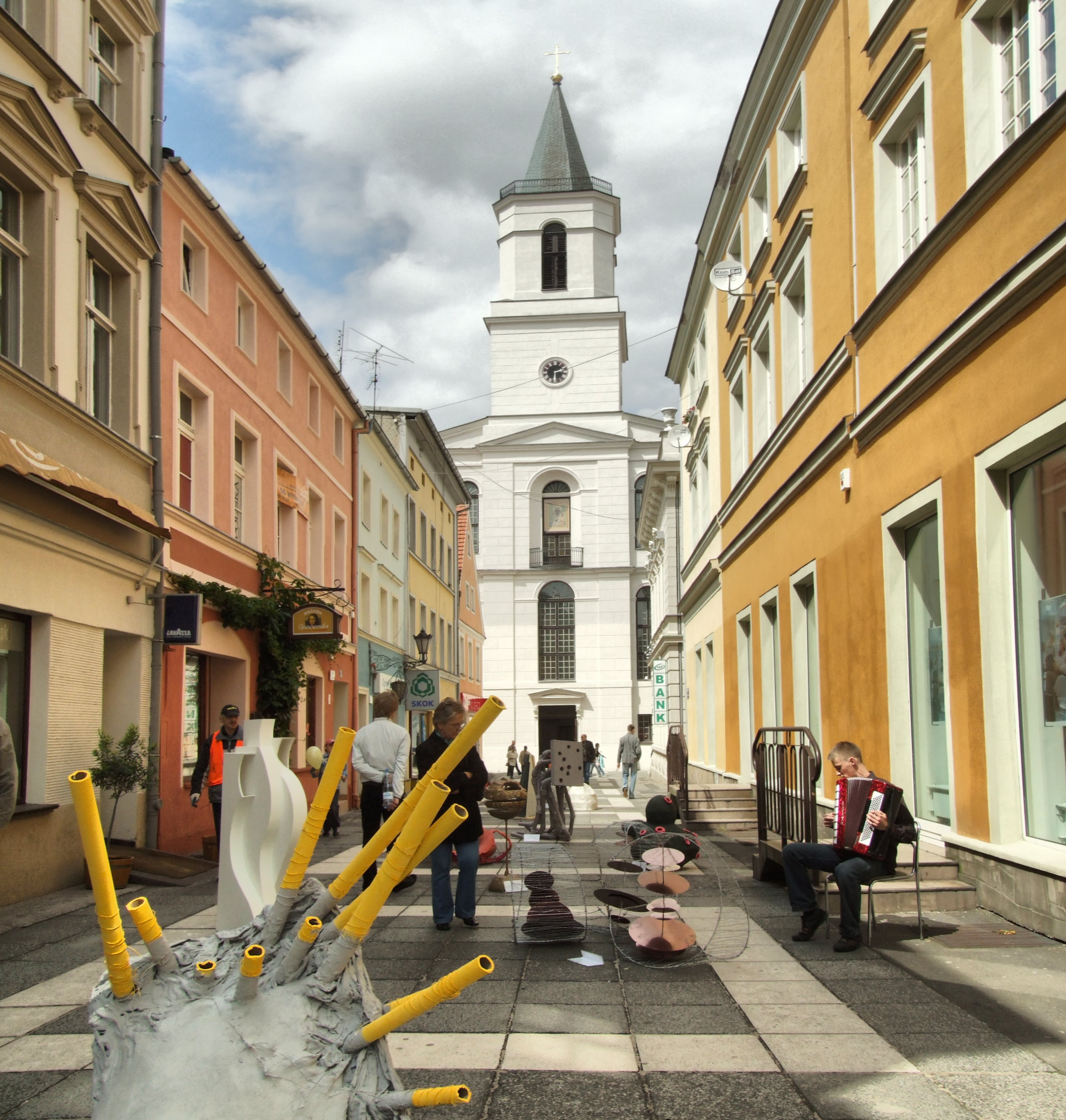 Ulica Mariacka w Zielonej Górze. Instalacja przygotowana przez pracownię rzeźby Wydziału Artystycznego UZ.